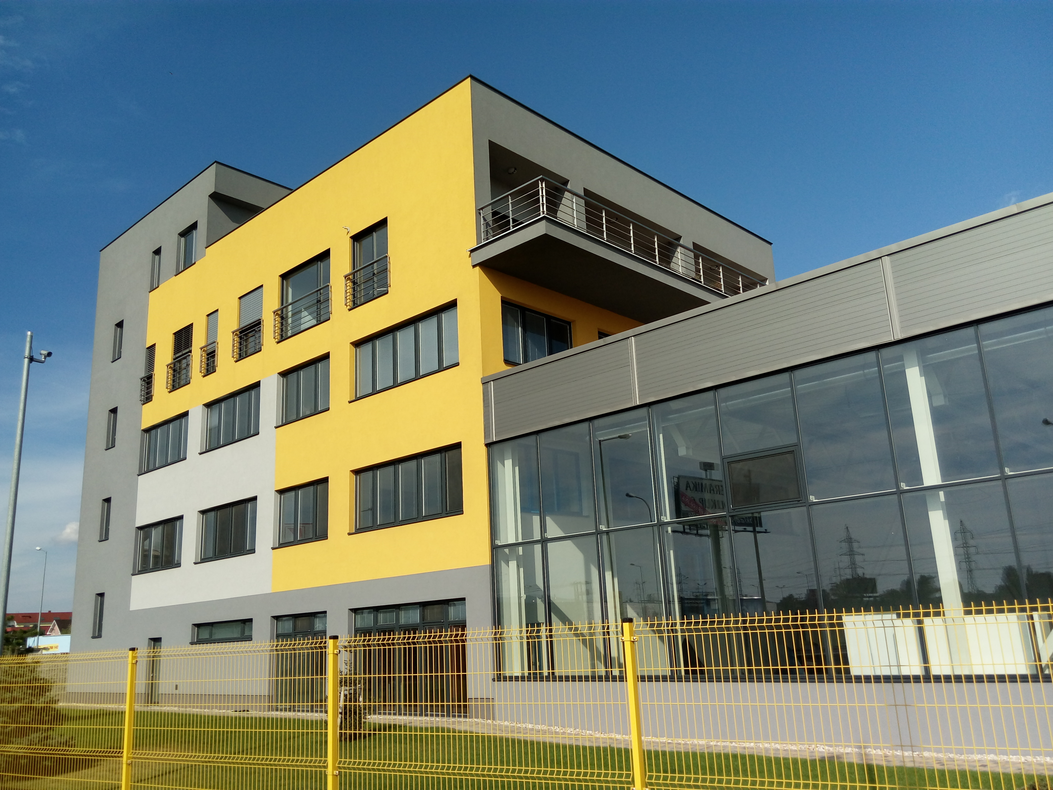 Prípojná 5, Podunajské Biskupice, Bratislava